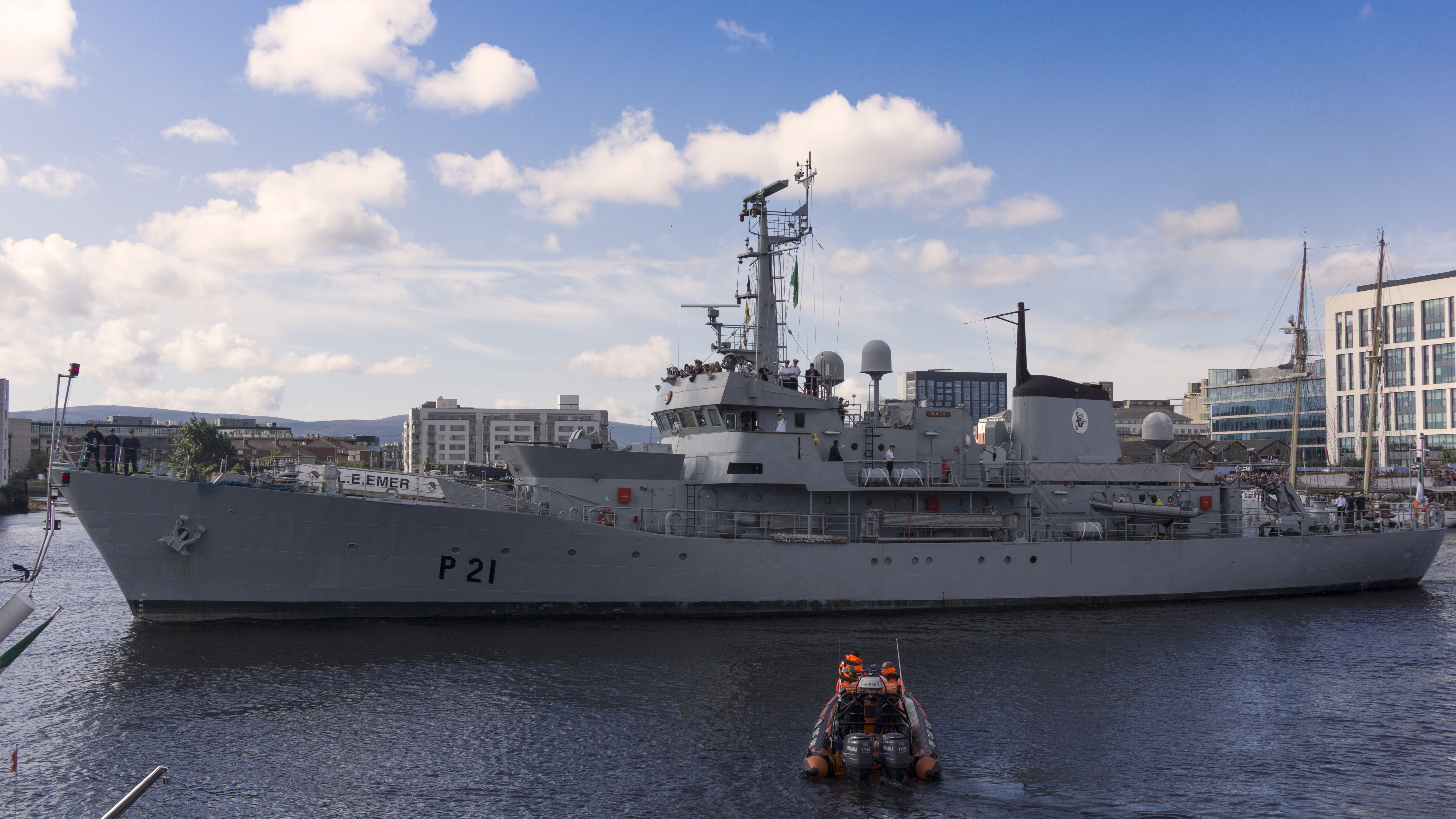 LÉ Emer (P21)